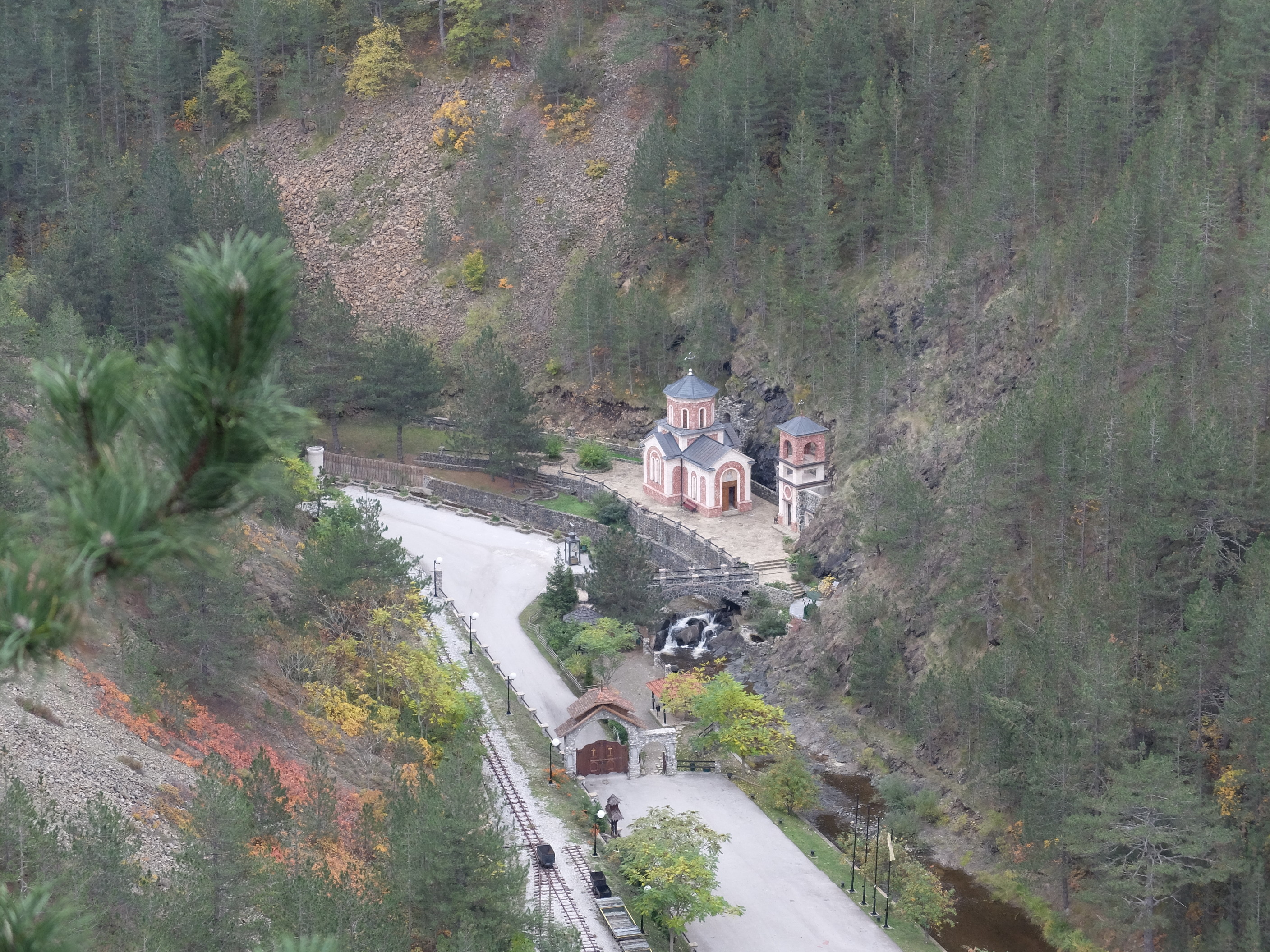 Heilquelle Izvor Bela Voda